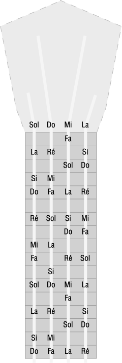 Les positions des notes sur un ukulélé accordé en Do illustration créée par Utilisateur:Ukepedia pour un site personnel, mise sous GFDL par l'auteur pour utilisation sur Wikipédia